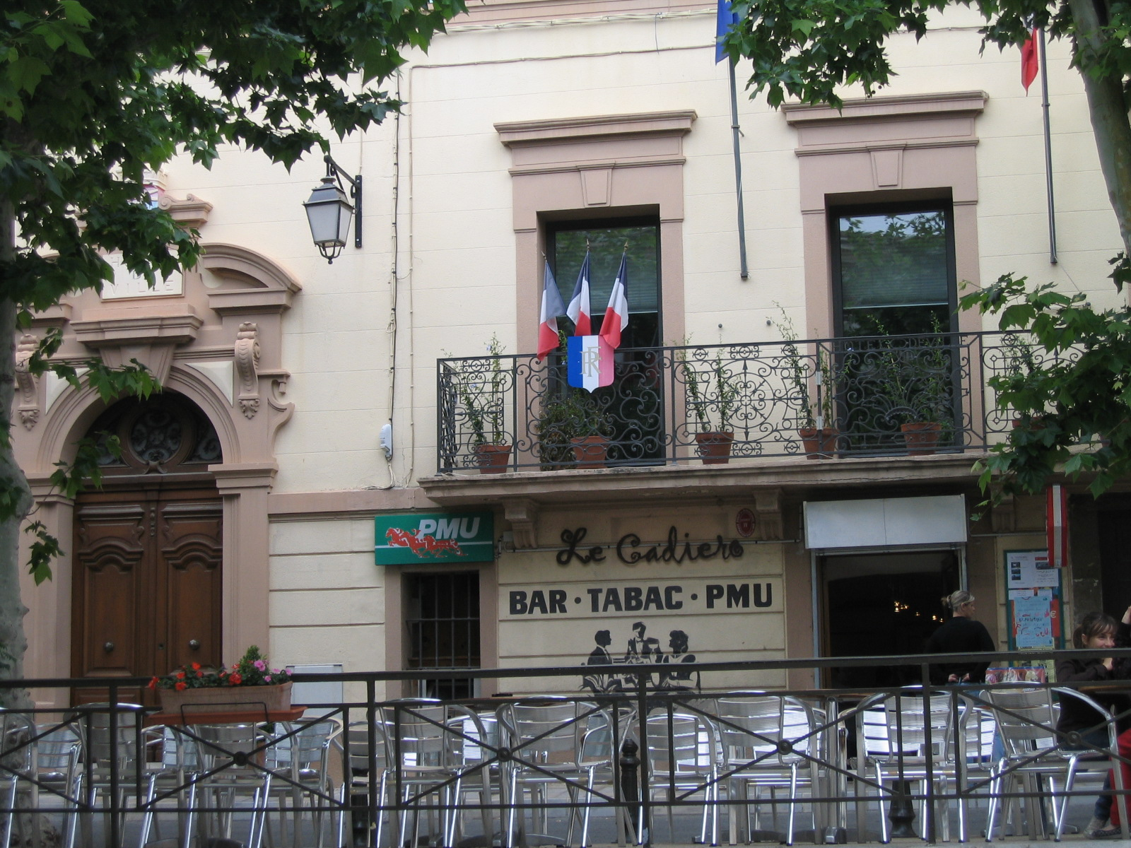 La Cadière d'Azur. La Mairie